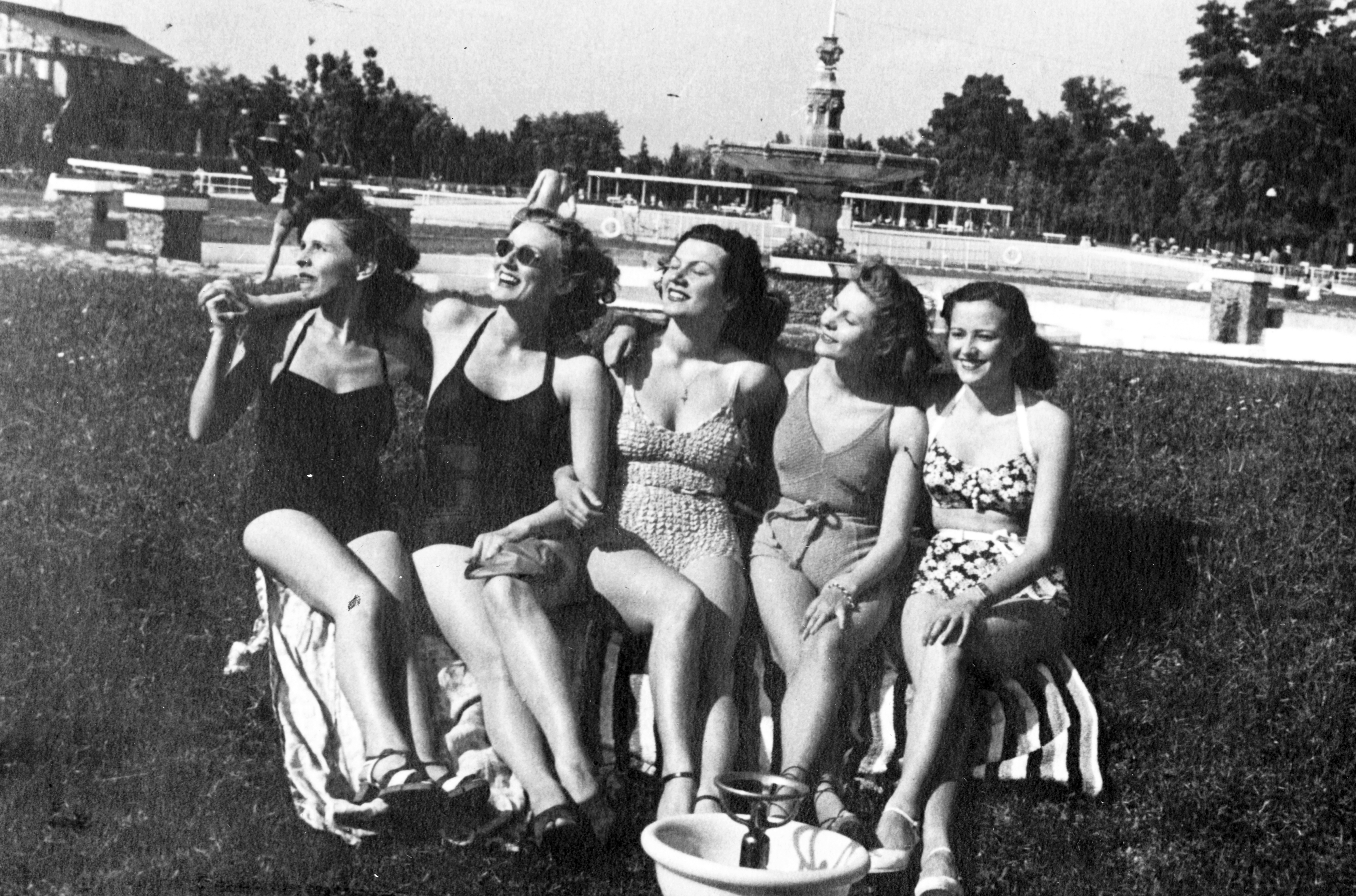 Palatinus Strandfürdő. Balról-jobbra: Nagykovácsi Ilona, Simor Erzsi, Somló Vali, Egry Mária, Lengyel Irén színésznők. Location: Hungary, Budapest, Margit Islands Title: Palatinus Strandfürdő. Balról-jobbra: Nagykovácsi Ilona, Simor Erzsi, Somló Vali, Egry Mária, Lengyel Irén színésznők.